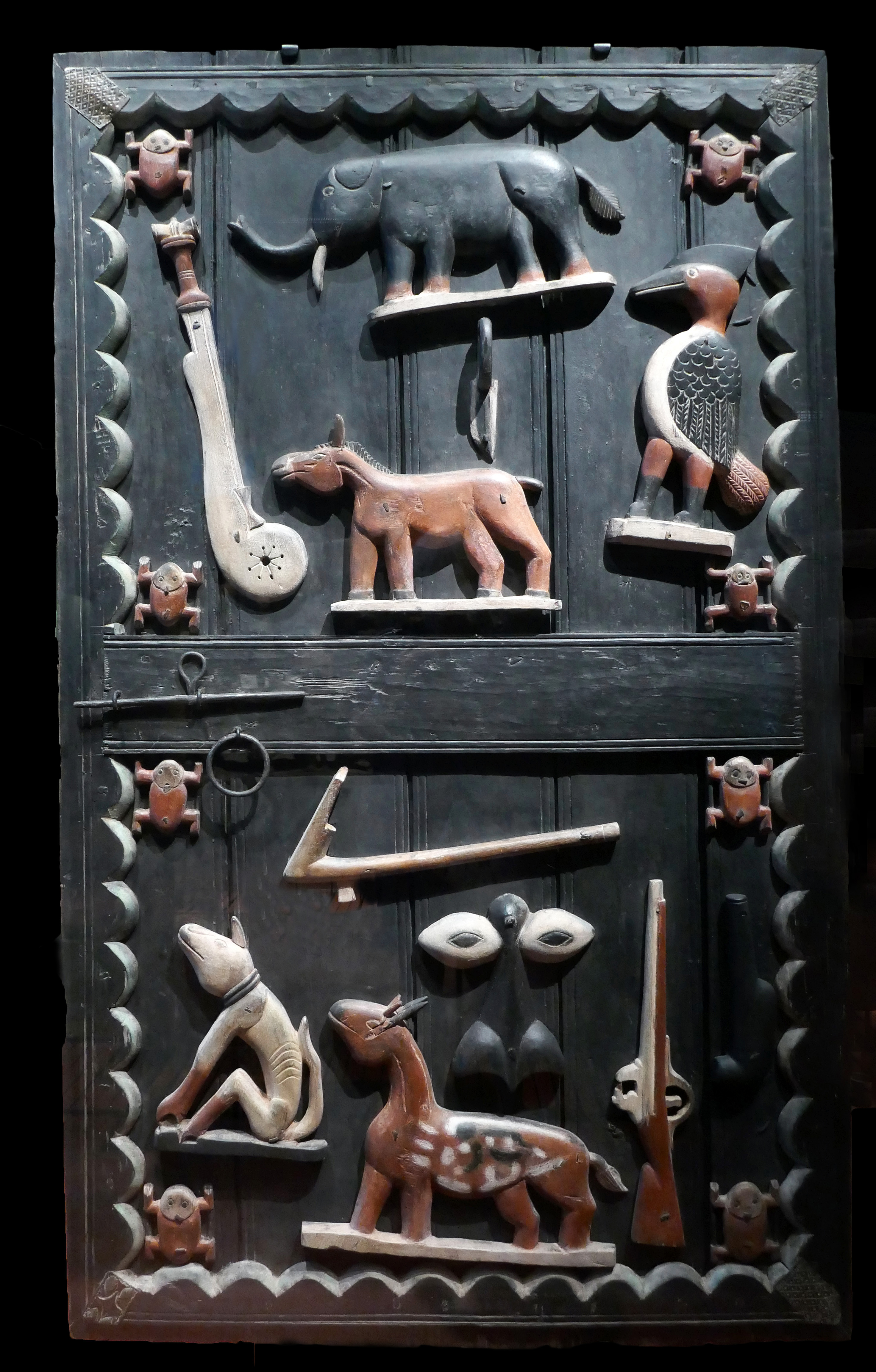 Porte du palais royal d'Abomey Atelier Sossa Dede Date : vers 1889 Bois polychrome, pigments, métal L'une des 4 portes exposées au musée du Quai Branly. N° d'inventaire : 71.1893.45.5